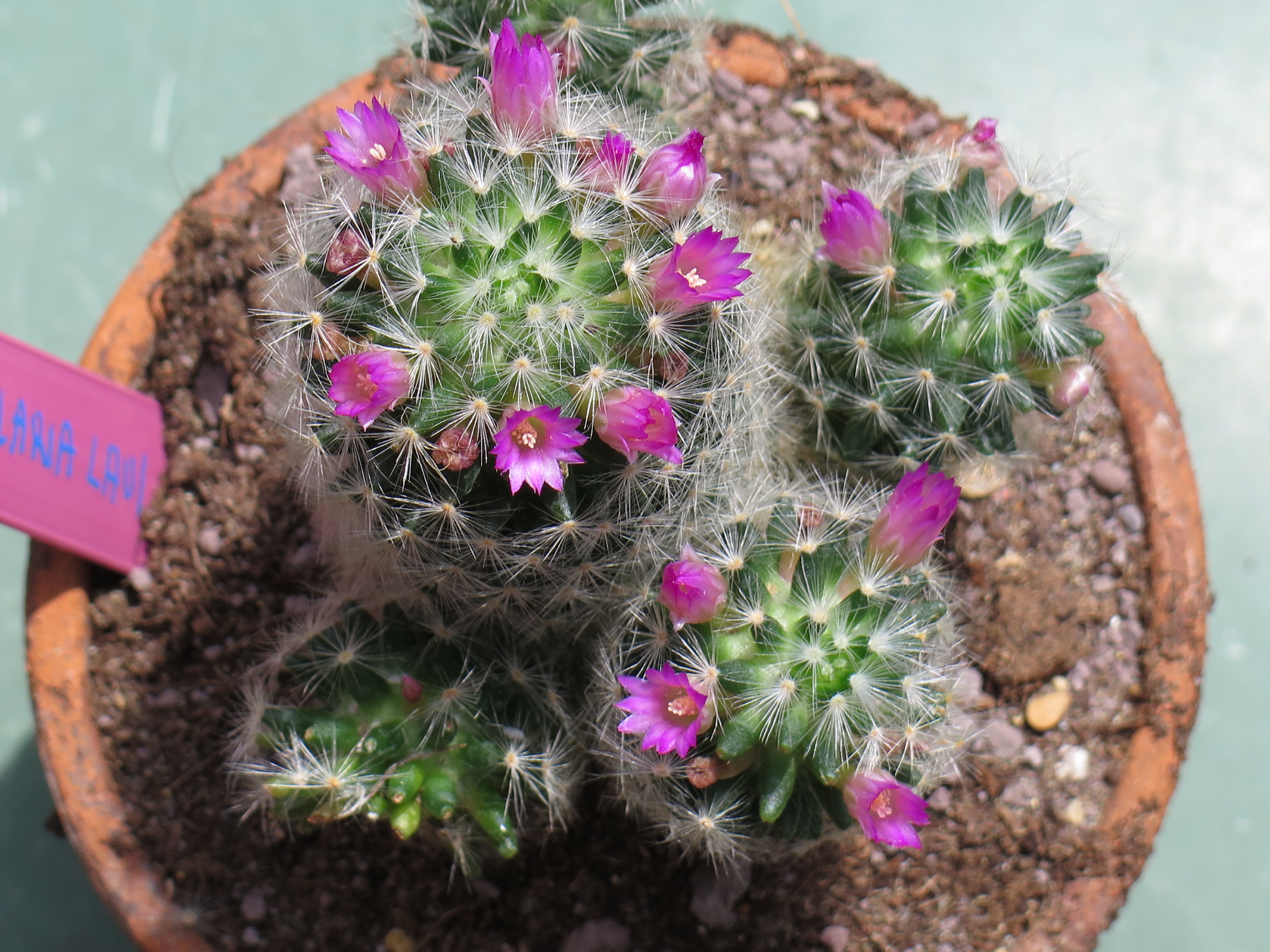 Mammillaria laui